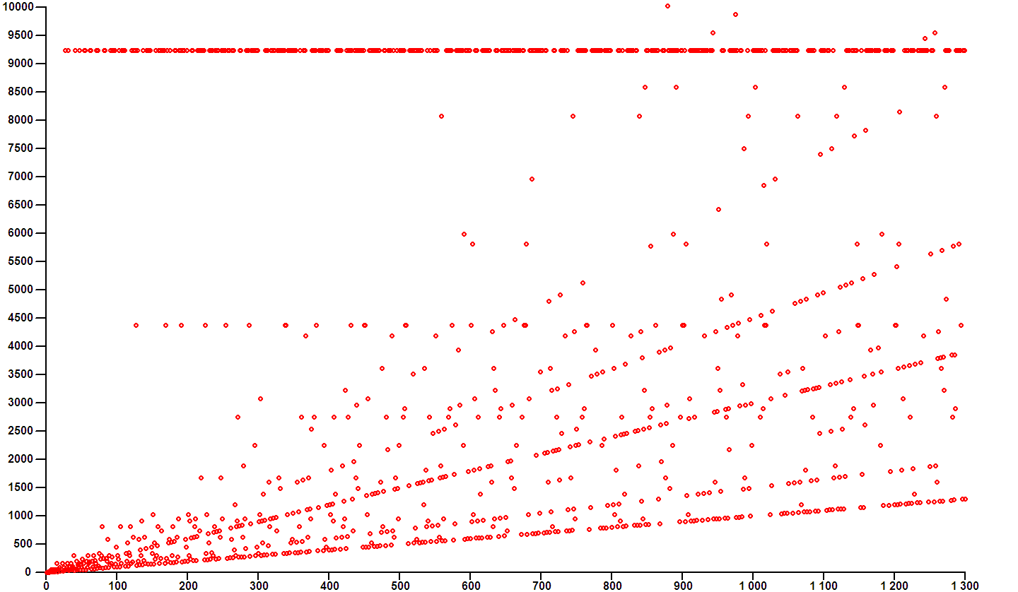 Diagrama de cotas superiores para el algoritmo 3n+1 / n/2 (Conjetura de Ullam)